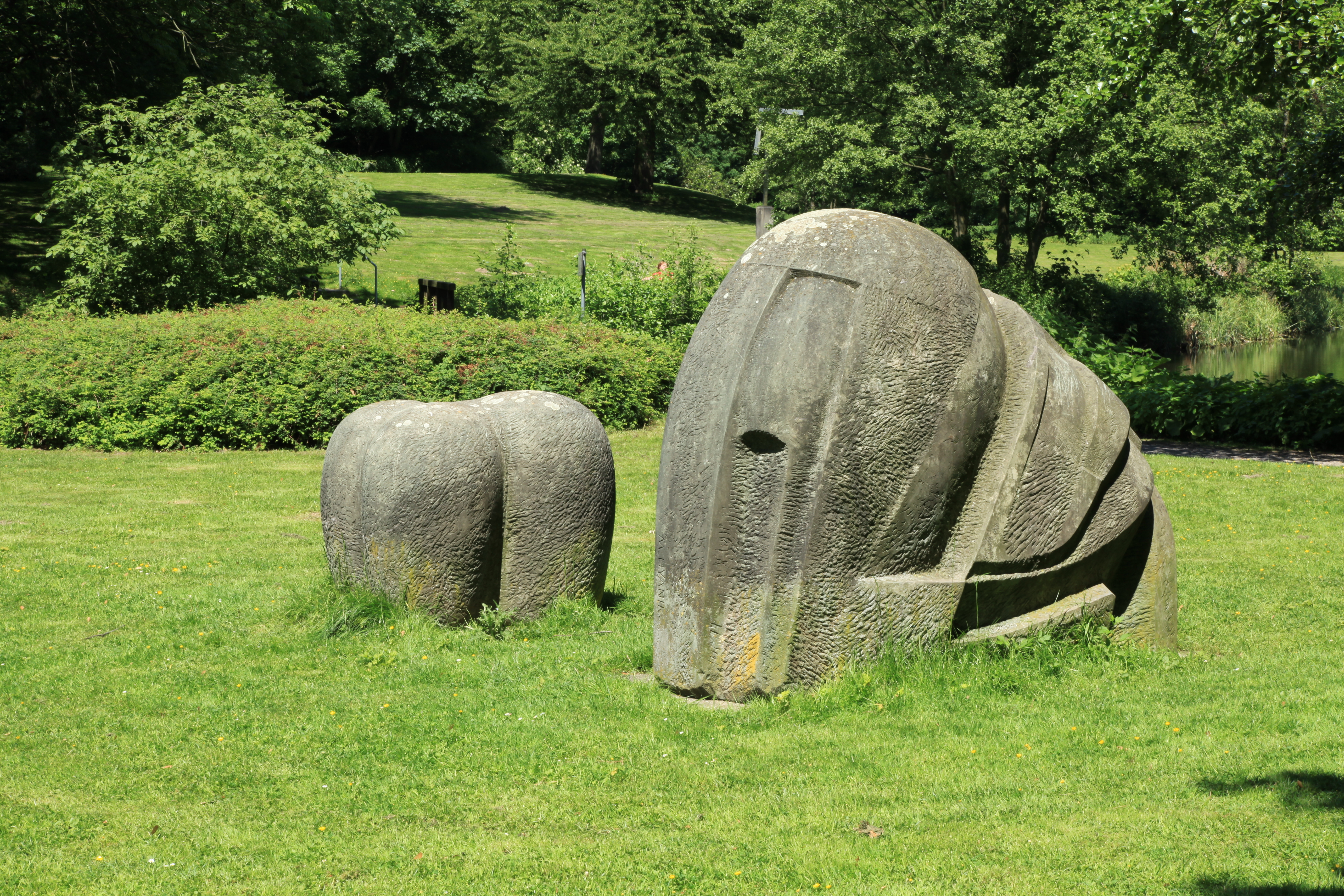 Skulptur im Schlosspark Goldschmieding, Dortmunder Straße in Castrop-Rauxel